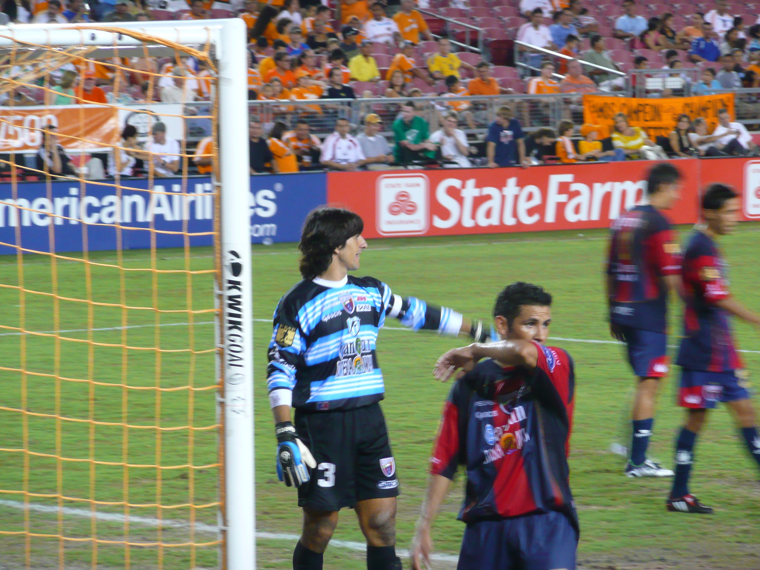 Équipe mexicaine de football d'Atlante